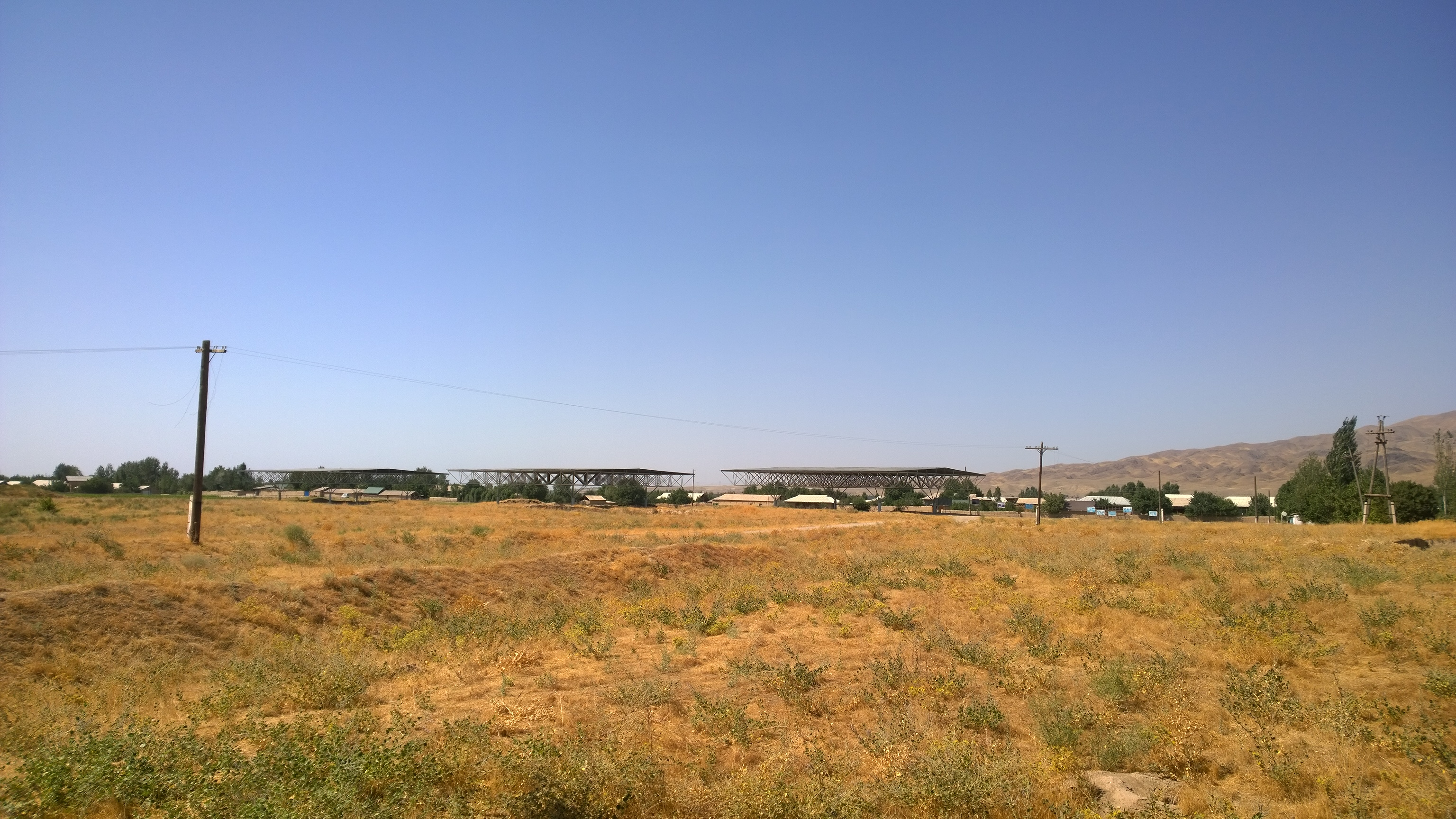 Тоҷикӣ: Саразм, намои умумӣ